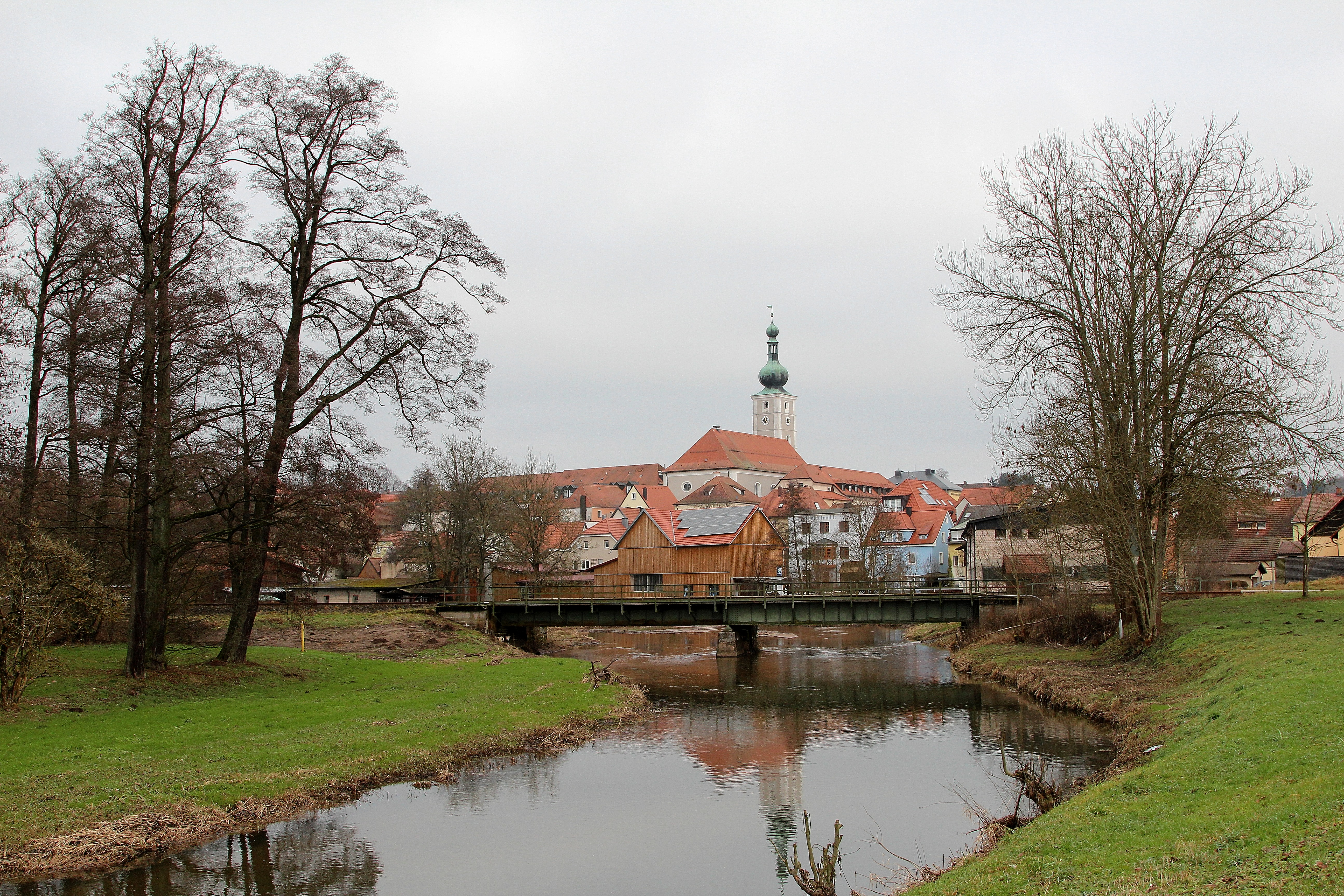 Pressath (im Hintergrund die katholische Pfarrkirche St. Georg, im Vordergrund der Fluss Haidenaab, der sich bei Luhe-Wildenau mit der Waldnaab zum Fluss Naab vereinigt), Landkreis Neustadt an der Waldnaab, Oberpfalz, Bayern (2015)